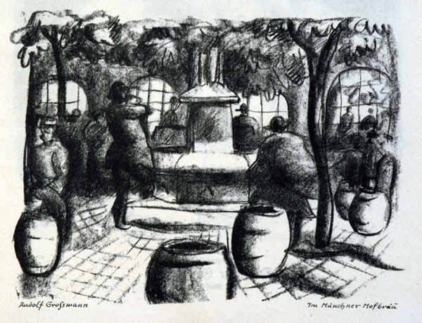 Im Münchner Hofbräu; Lithografie aus Paul Cassirers "Bildermann"